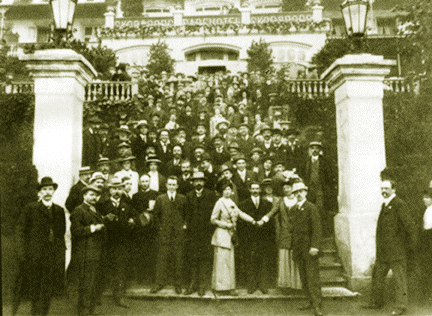 Teilnehmer des Internationalen Sozialistenkongresses 1910 in Kopenhagen